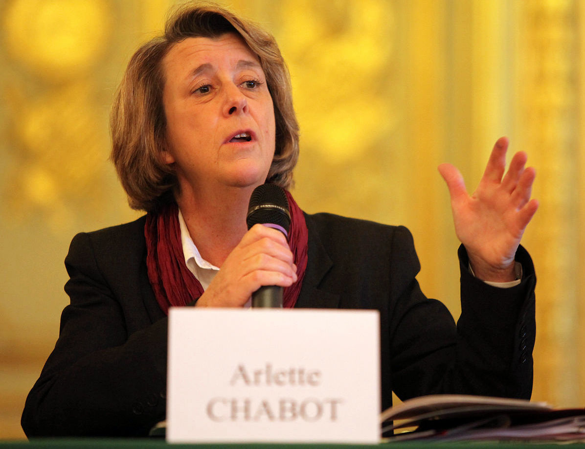 Arlette Chabot à la journée du livre politique, en avril 2009.